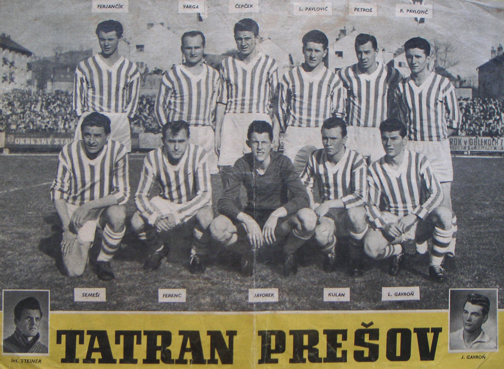 Ing. Steiner - tréner Tatran Prešov